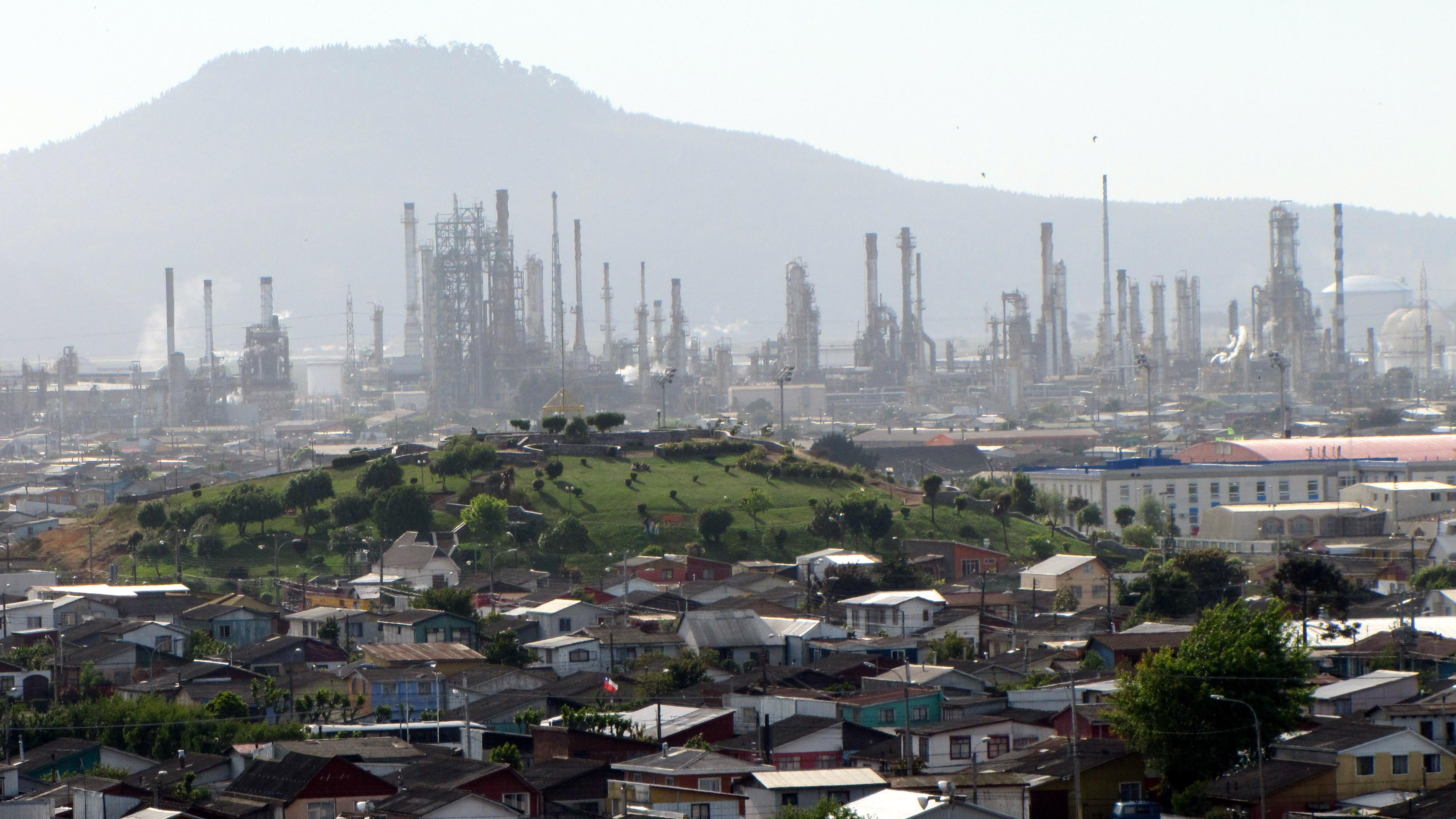 Panorámica de Hualpén